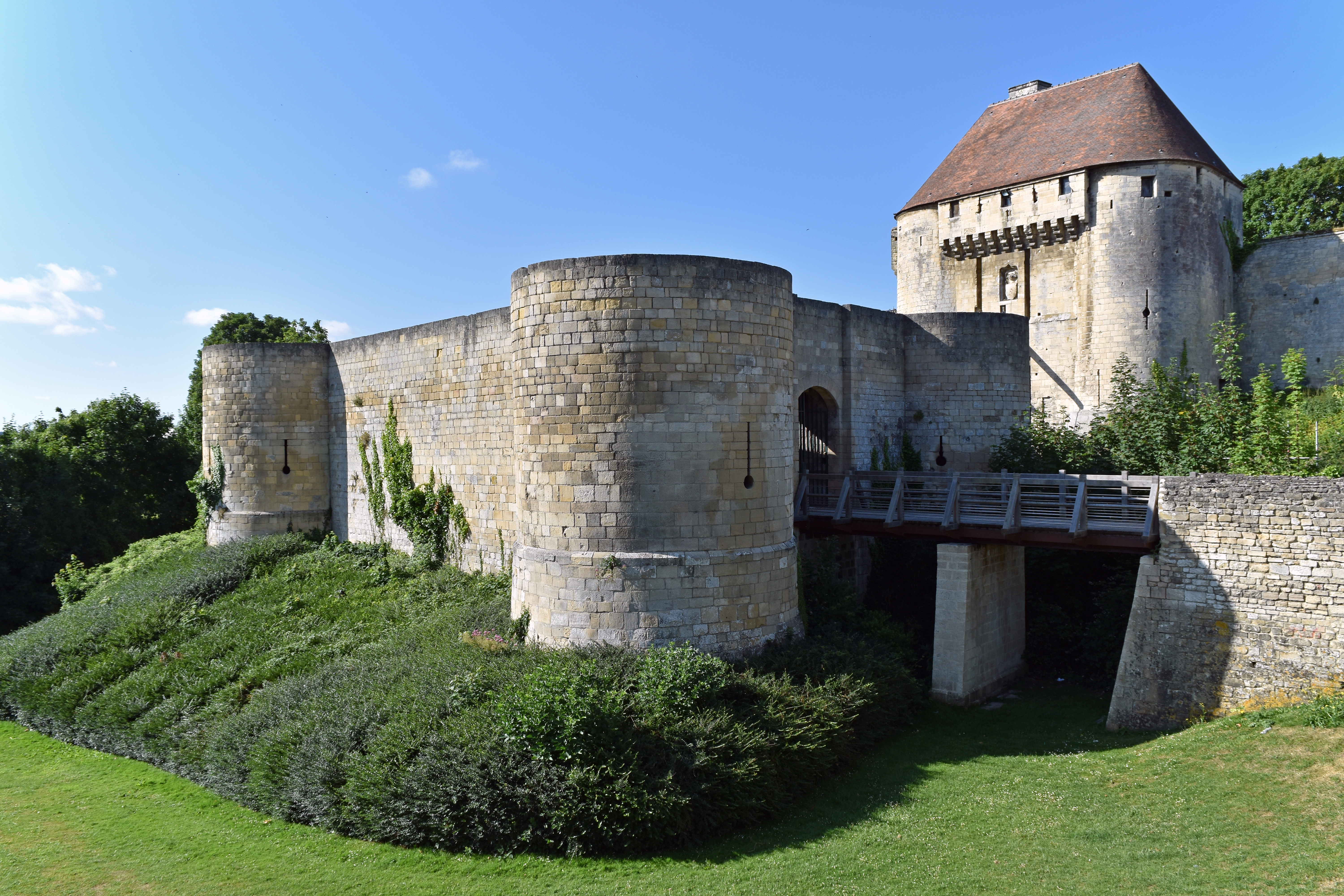 Barbacane de la Porte des champs du chateau de Caen, Calvados, France .